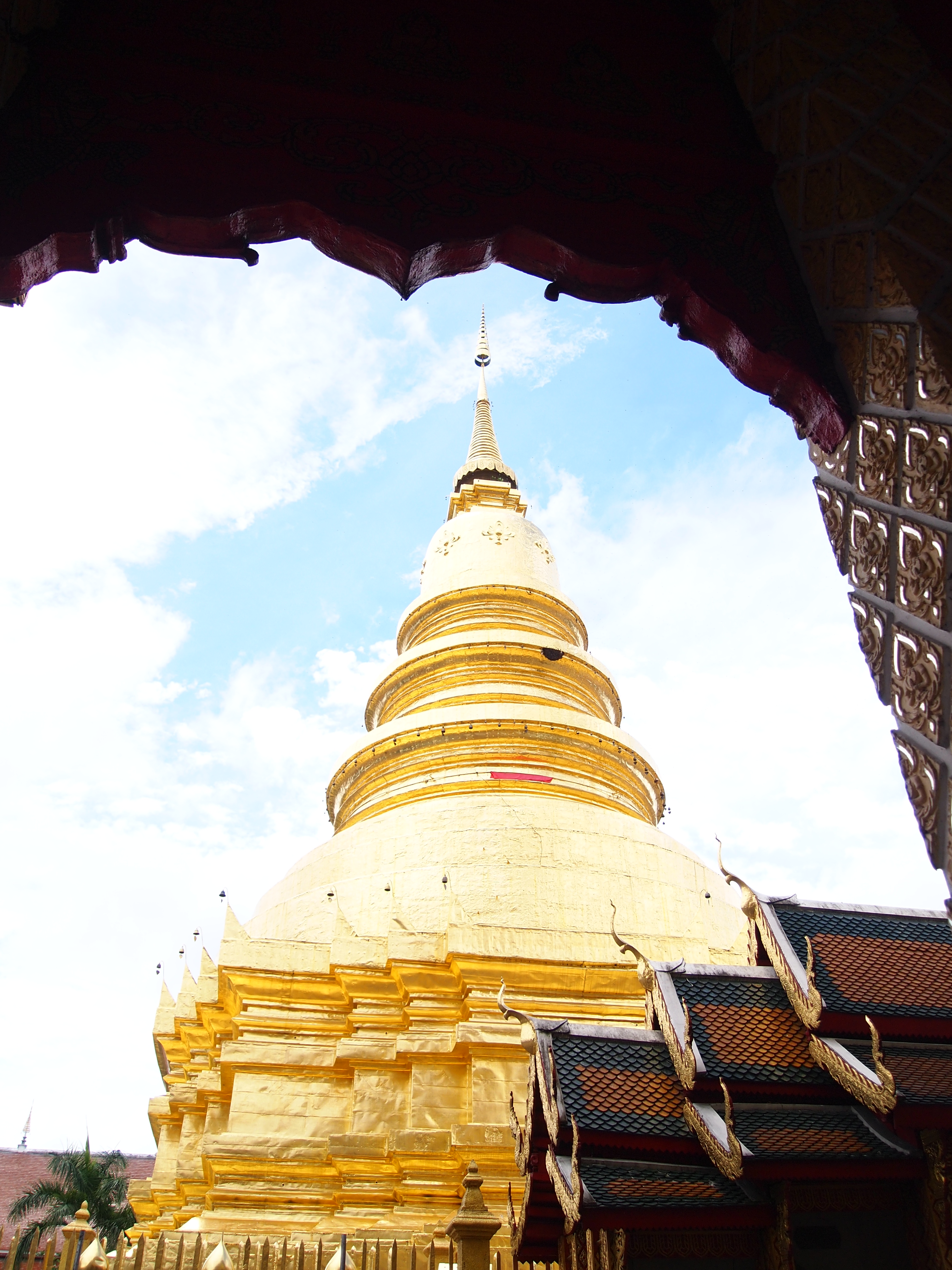 รักทุกย่างก้าวกับความศรัทธา